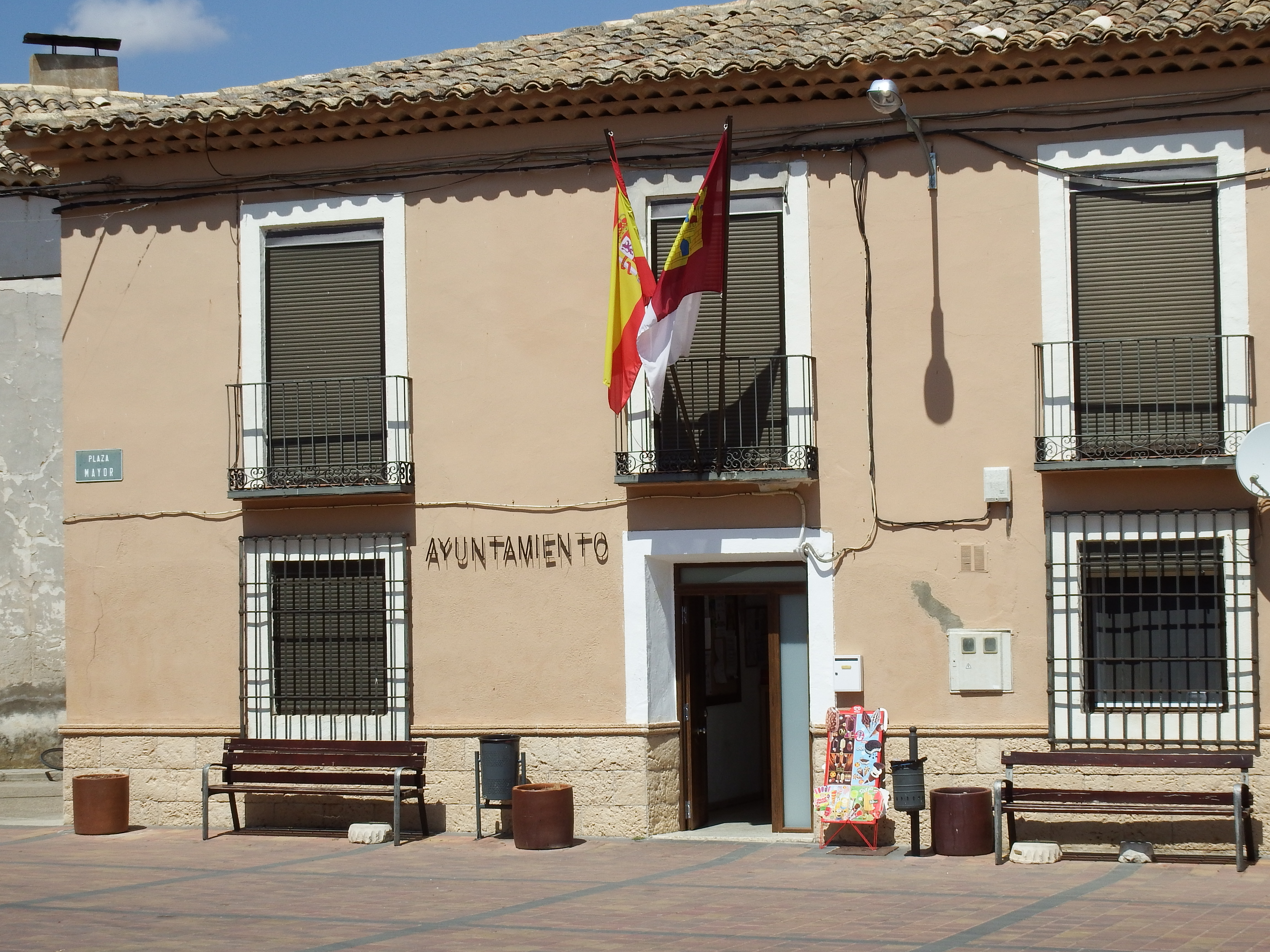 Villar y Velasco. Cuevas de Velasco, Ayuntamiento.